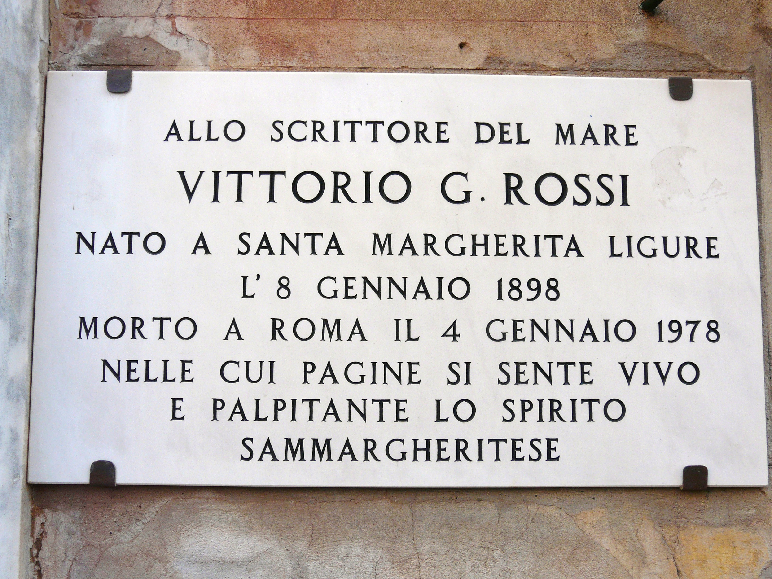 Palazzo dove nacque lo scrittore e poeta Camillo Sbarbaro, Santa Margherita Ligure, Liguria, Italia